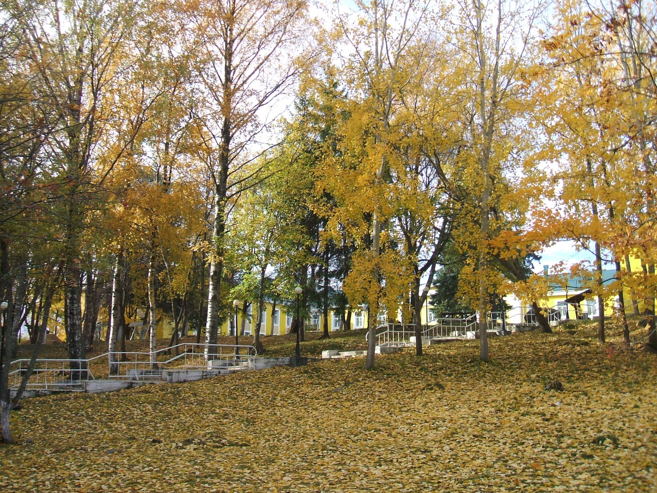 п.Смолячково СПб психо-неврологический интернат